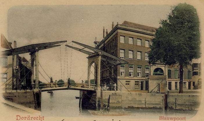 ansicht blauwpoort met brug